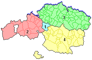 Bizkaiko Barruti Elektoralak